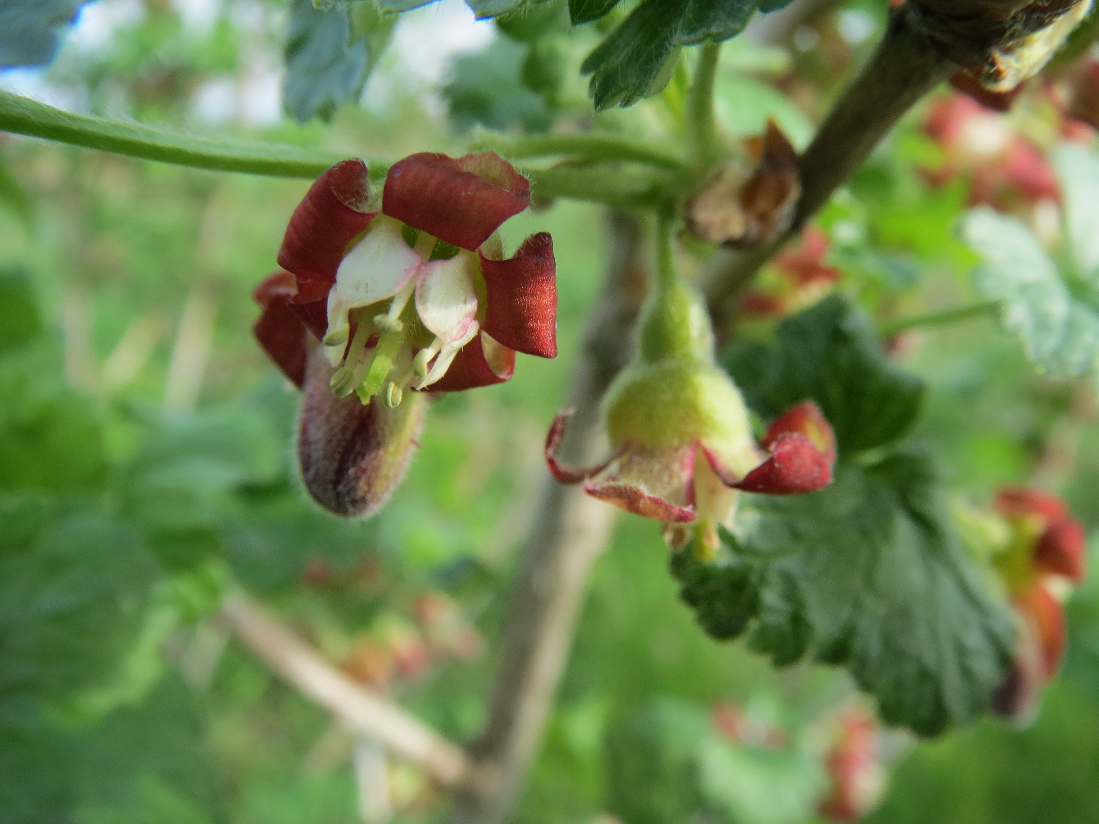 Stachelbeere (Ribes uva-crispa) bei Reilingen